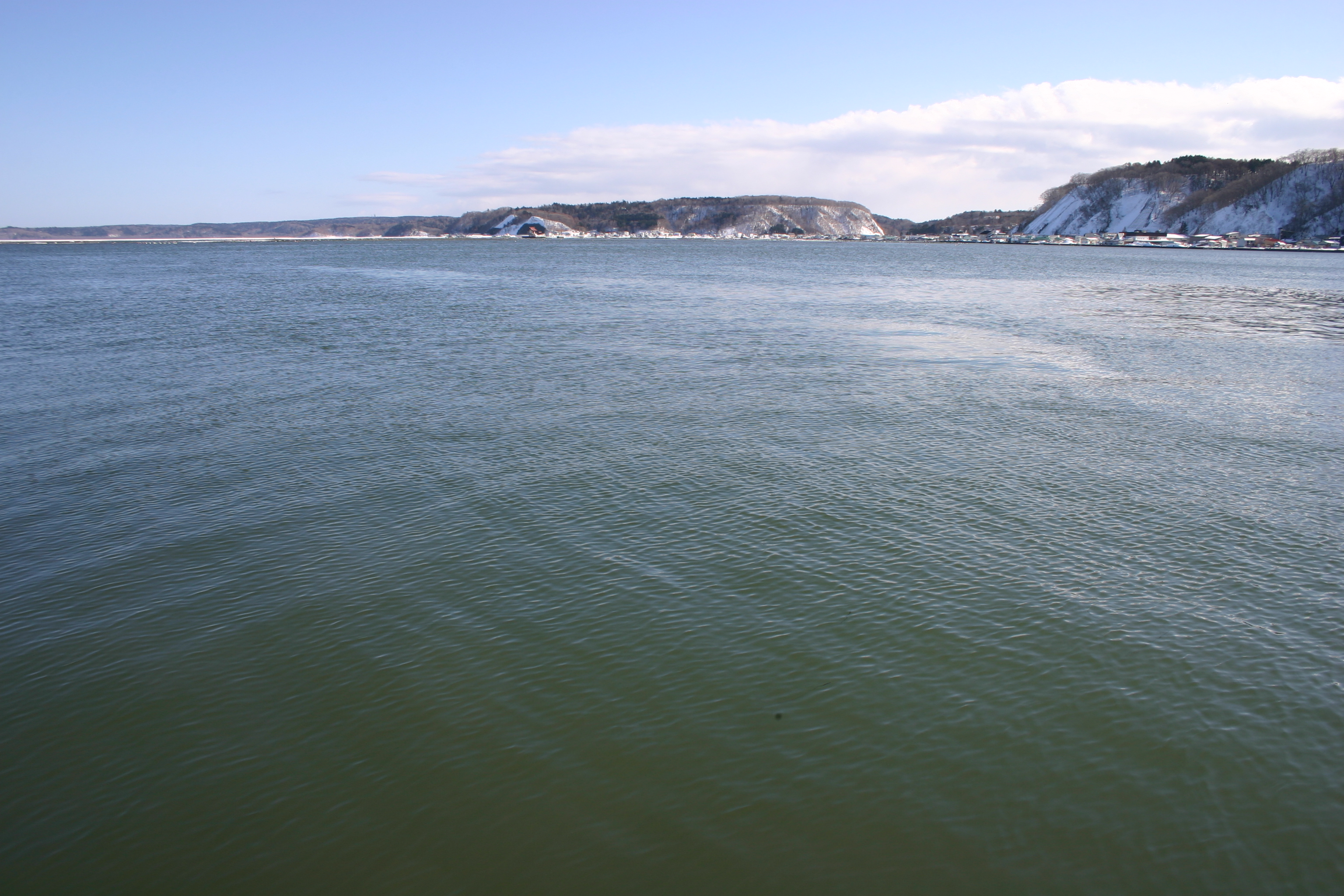 厚岸湖 湖北地区より